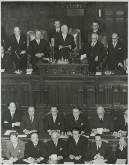 Il capo dello Stato Einaudi legge un discorso dopo il giuramento come presidente della Repubblica; accanto a lui ci sono Gronchi e Bonomi; di lato si vedono Scoccimarro e Mattarella; nei banchi del governo si riconoscono Grassi, De Gasperi, Pacciardi, Sforza, Gonella, Brusasca, Jervolino e Andreotti